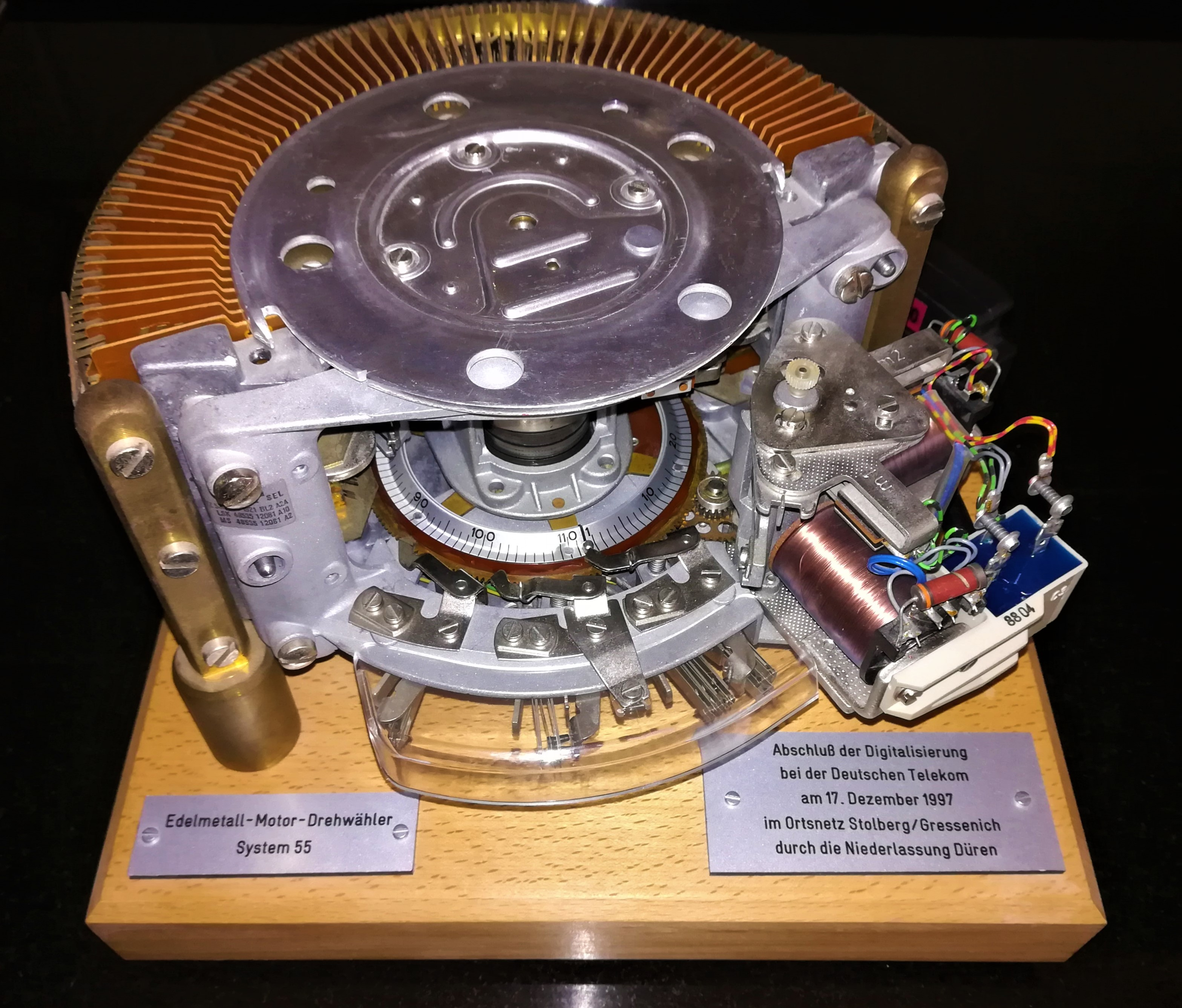 EMD-Wähler der letzten Vermittlungstelle Stolberg-Gressenich 1997